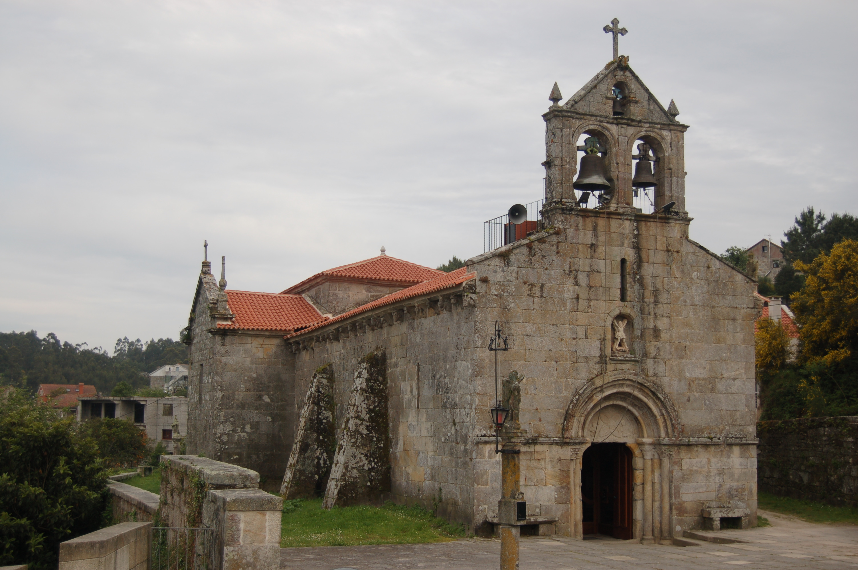 Igrexa parroquial de Santo André do Hío (Cangas)